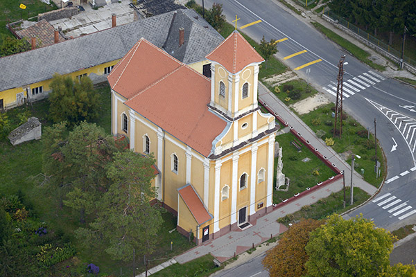 Bakonyszombathely, Szent Imre herceg templom légi felvételen